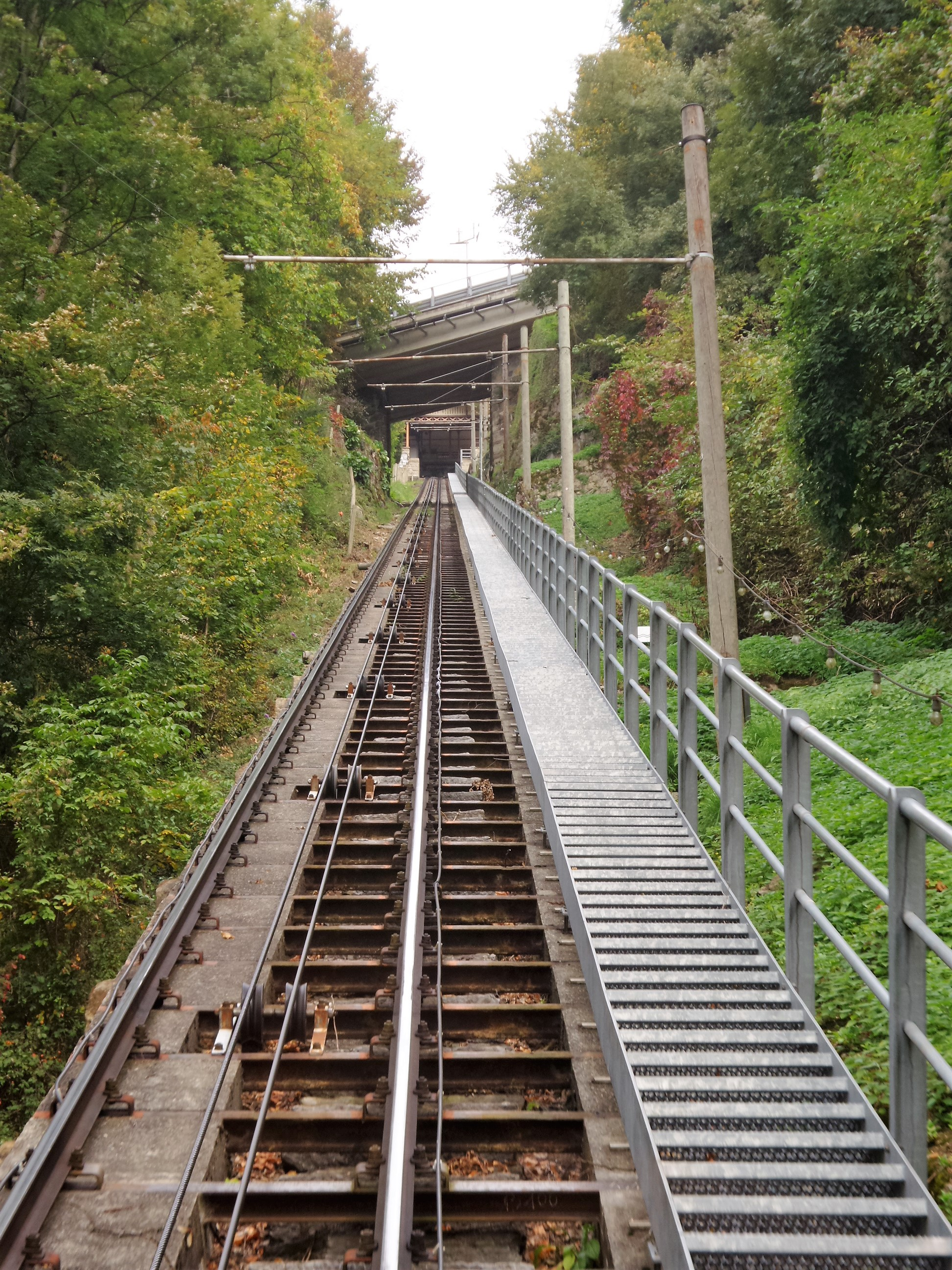 Standseilbahn Territet-Glion, Montreux, Chemin de fer funiculaire Territet–Glion